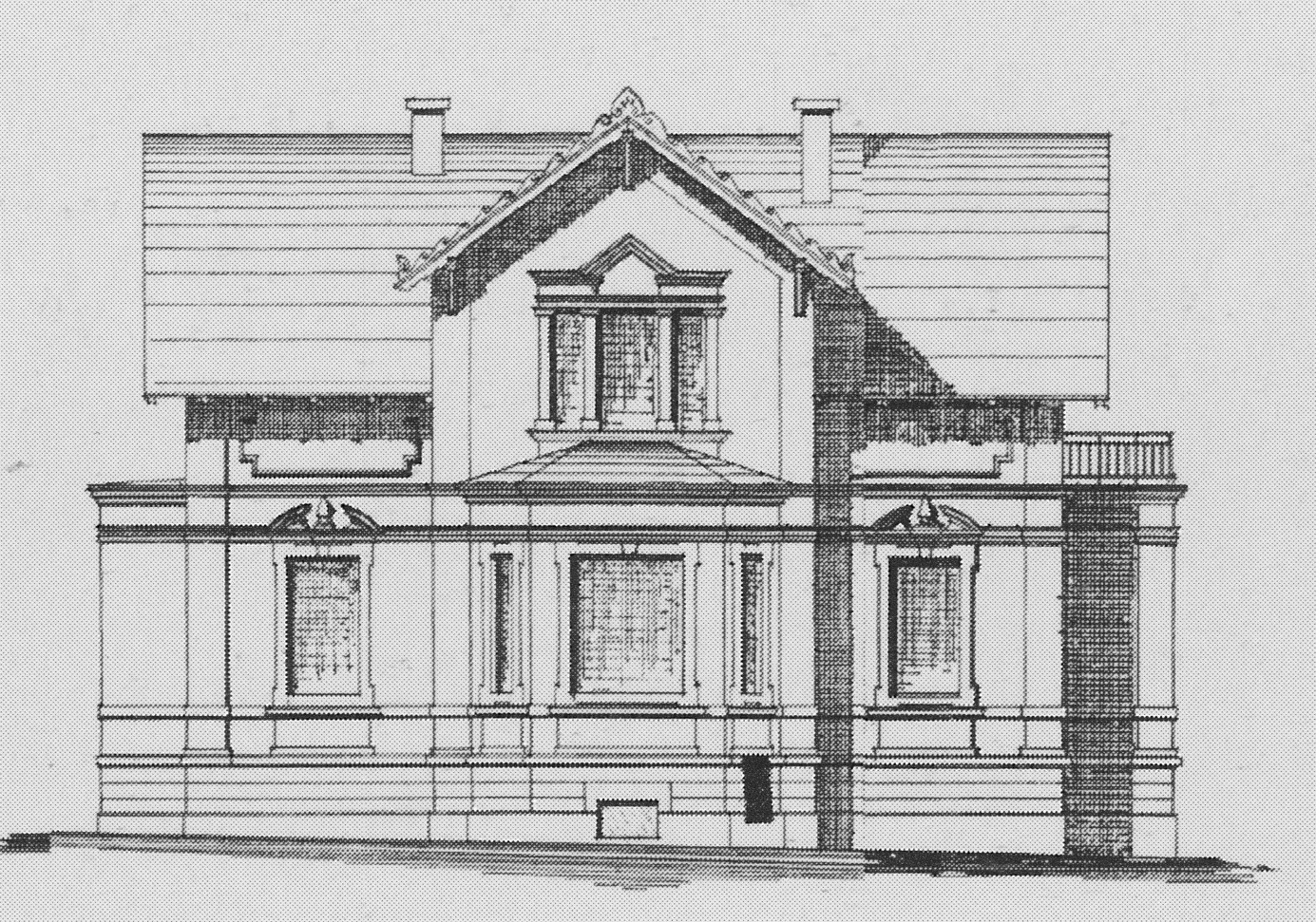 Radebeul Villa Paul Gottlieb Kunze Bauzeichnung 1907